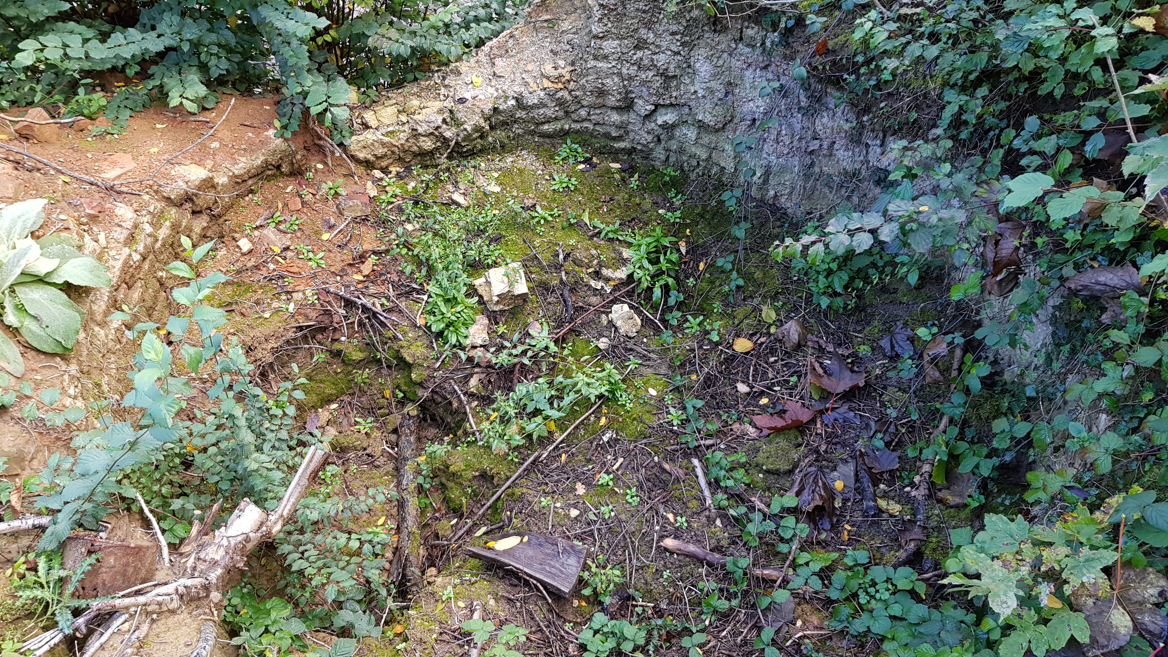 Kalkoven ingang Curfsgroeve, Geulhem, Nederland